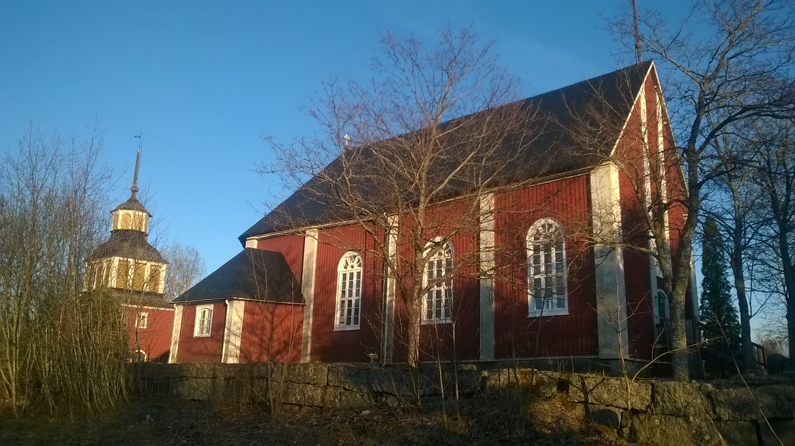 Raippaluodon kirkko